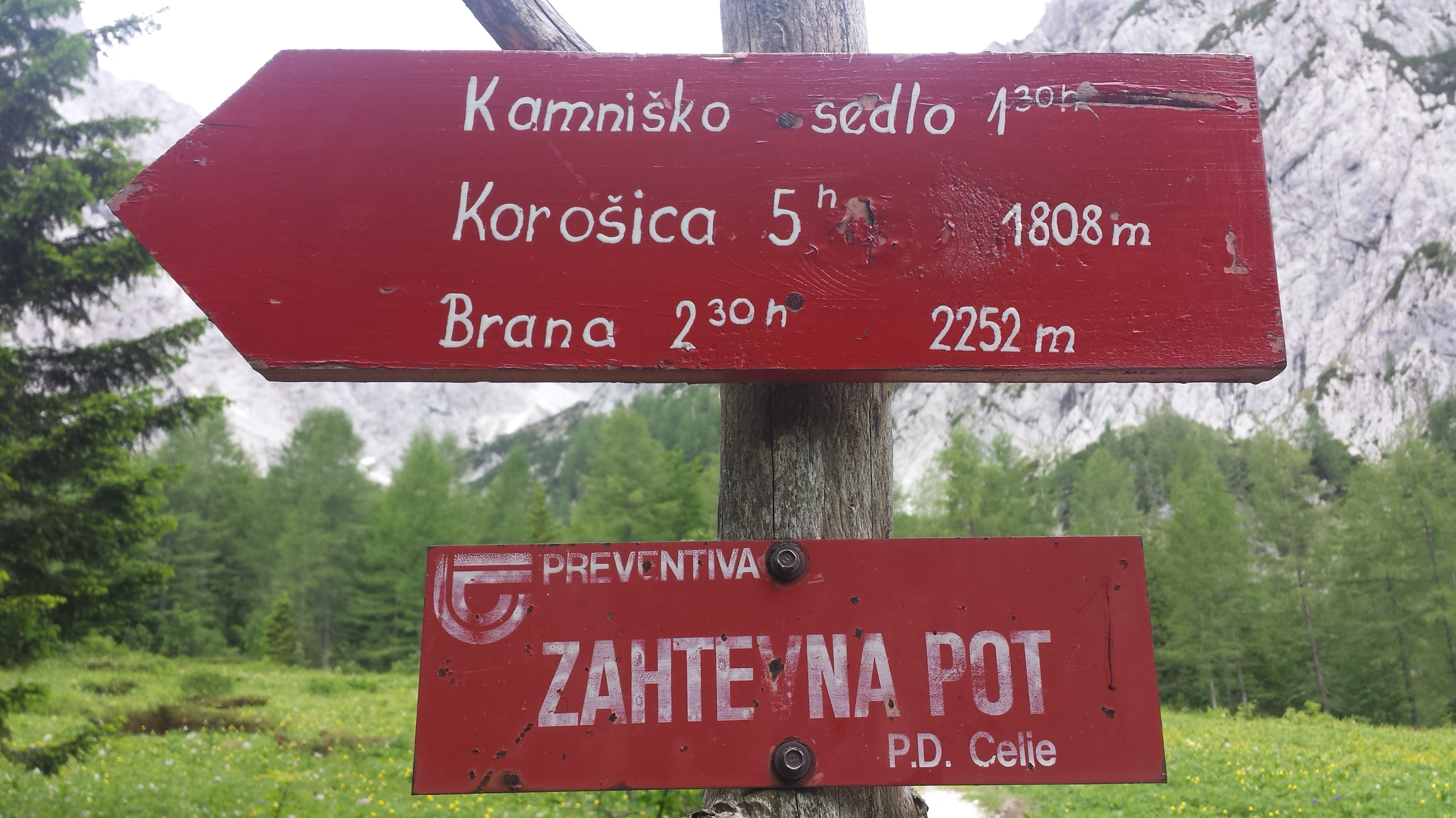 Okrešelj, Smerokazi pri koči